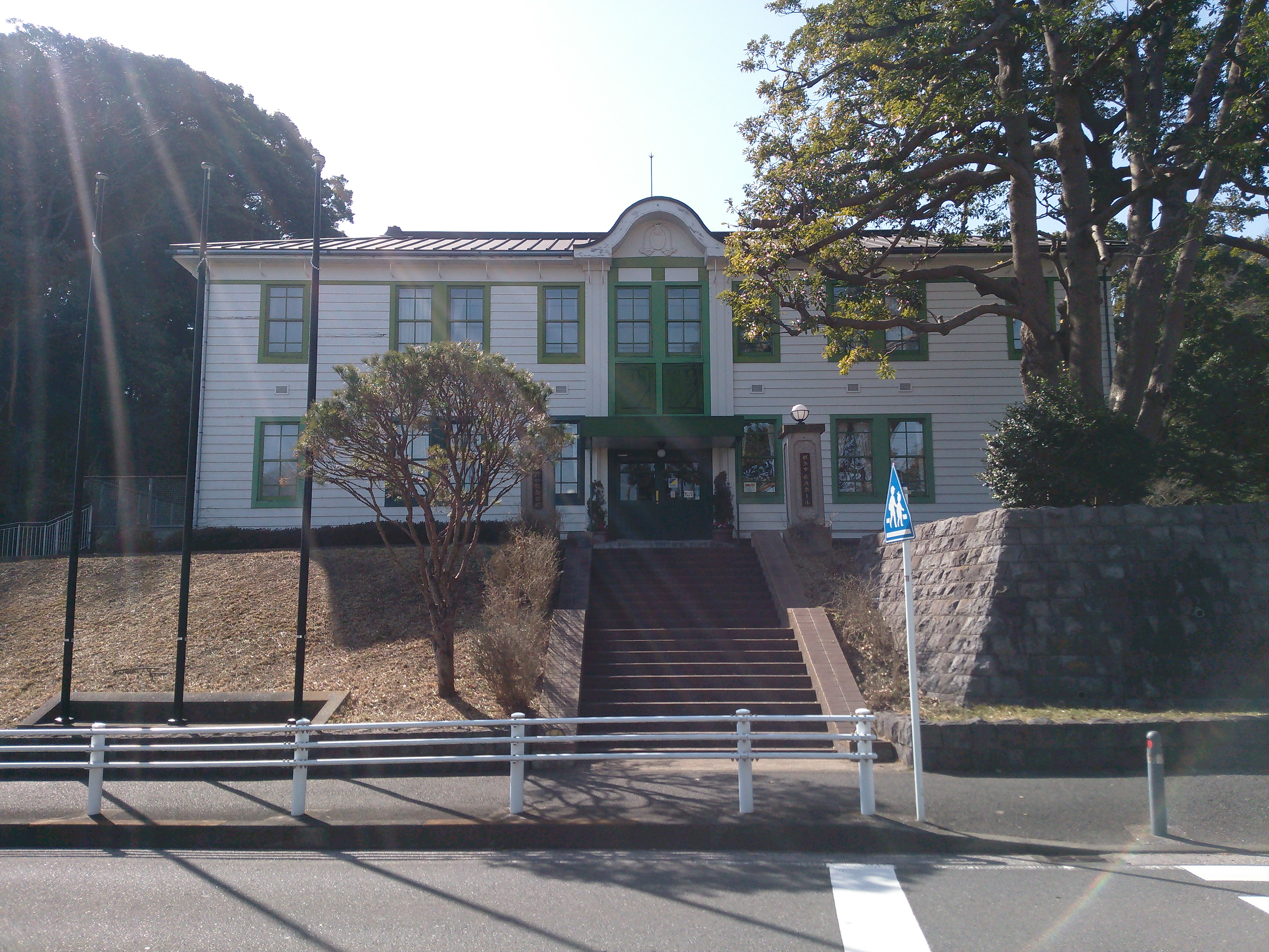 横浜市金沢区、長浜野口記念公園内にある長浜ホール